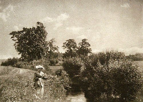 Hugo Henneberg En Eté [Photo-Club de Paris / 1894, Pl. XXXV] 1894 or other version: Im Hochsommer [Wiener Photographische Blätter: Herausgegeben Vom Camera-Club In Wien] 1894, January